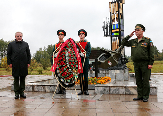 Первый заместитель Министра обороны РФ генерал армии Аркадий Бахин и Председатель Общественного совета МО РФ Павел Гусев на торжественной церемонии возложения венков к памятнику танкистам, погибшим в августе 1943 года во время Смоленской операции. Кубинка